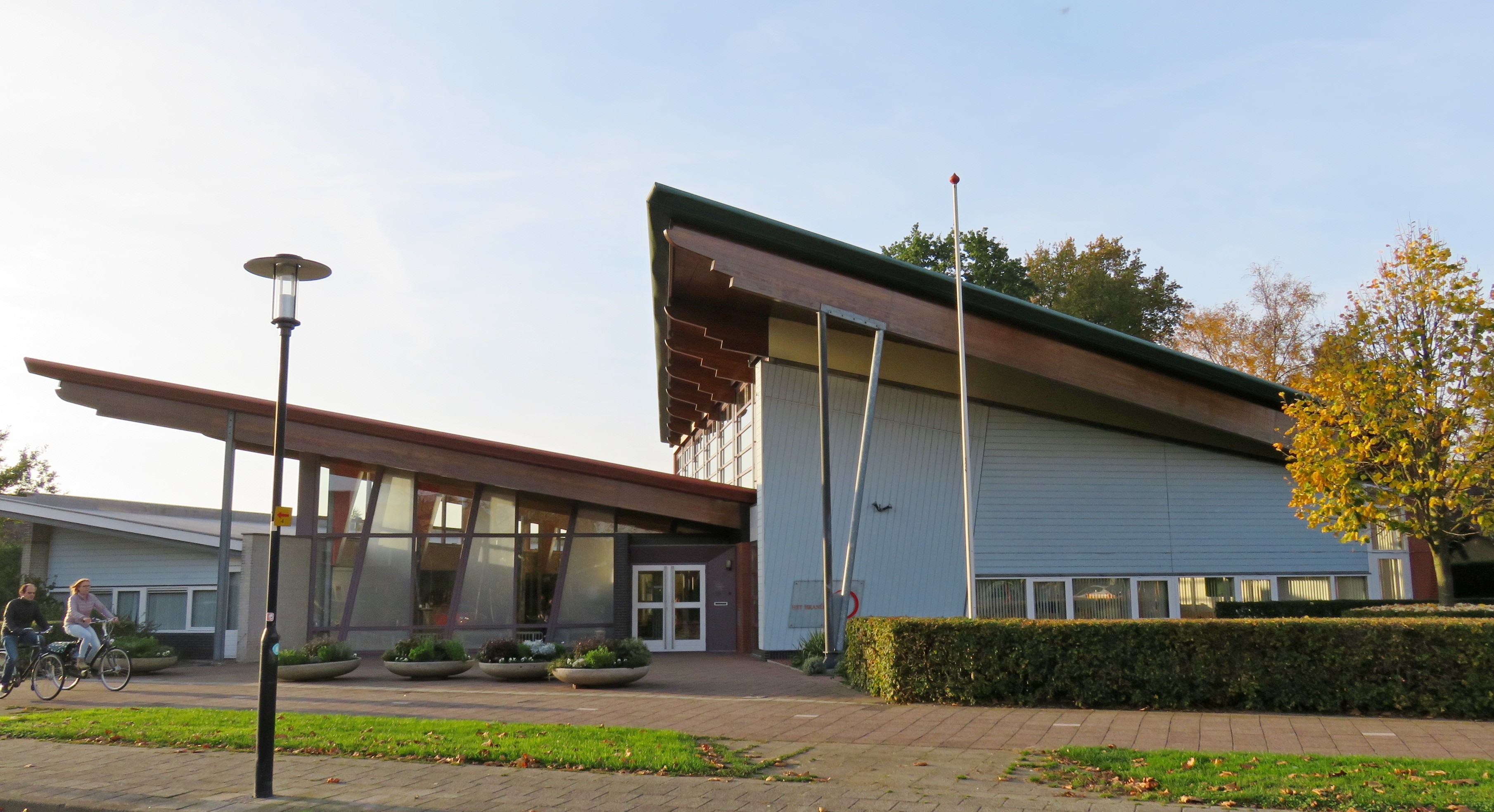 'Het Brandpunt' aan de Laan naar Emiclaer 101 te Amersfoort